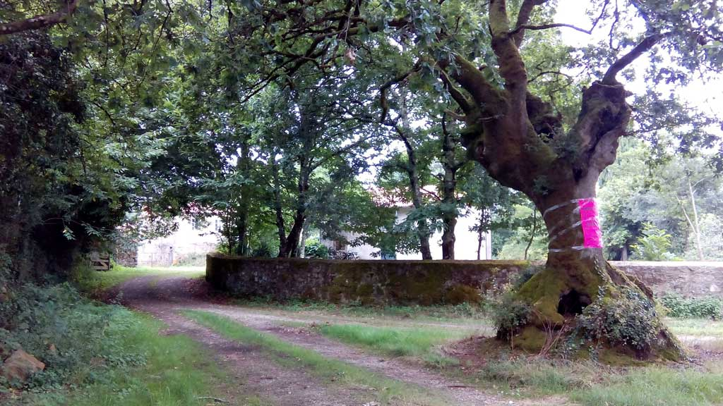 Vista da Penencia, Curtis.